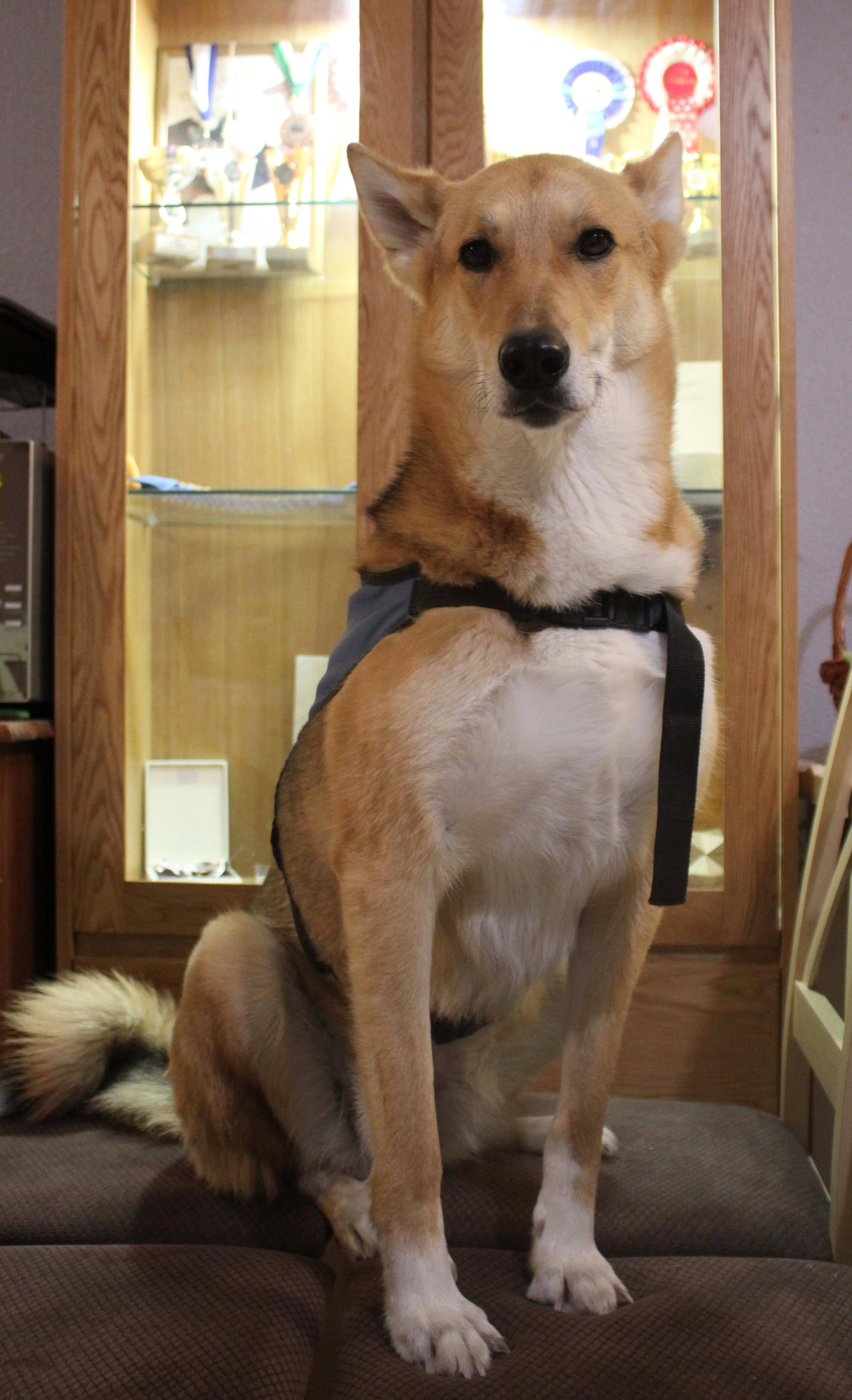 tõuta hüpokoer Simona 2018